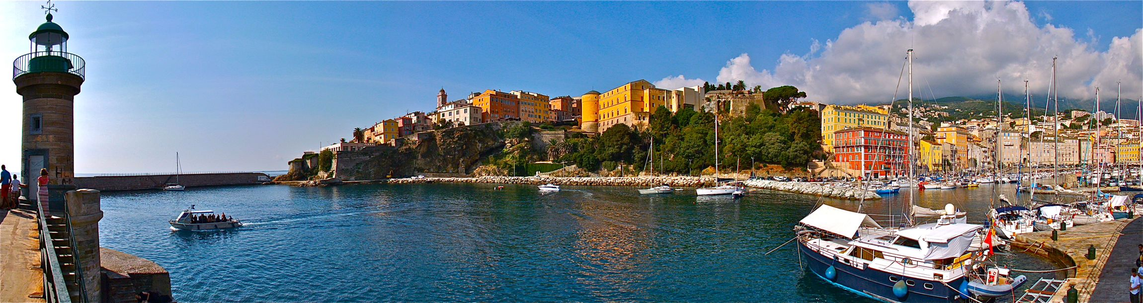 Panorama de la ville de Bastia, vieux port et citadelle.